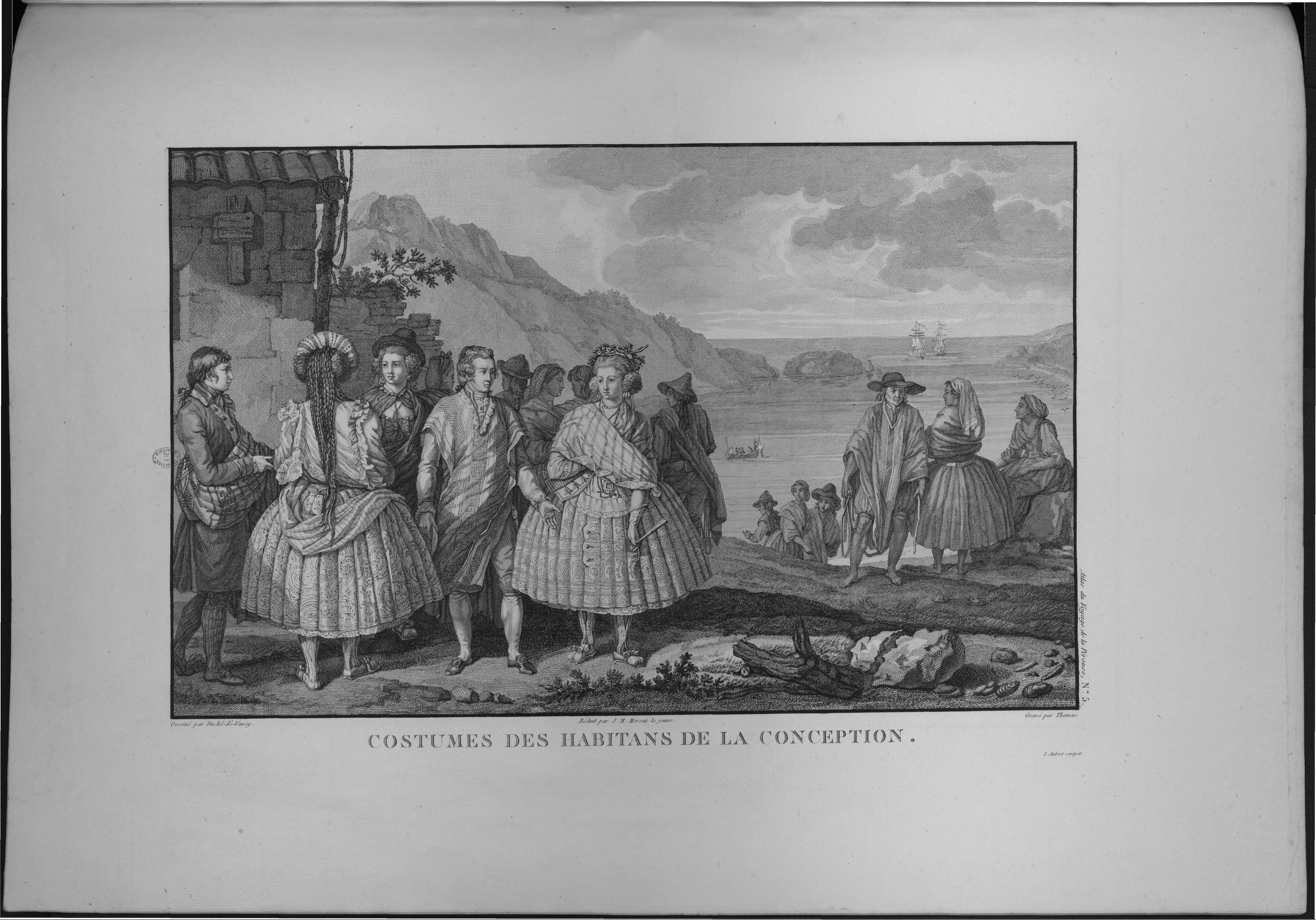 Atlas du voyage de La Pérouse